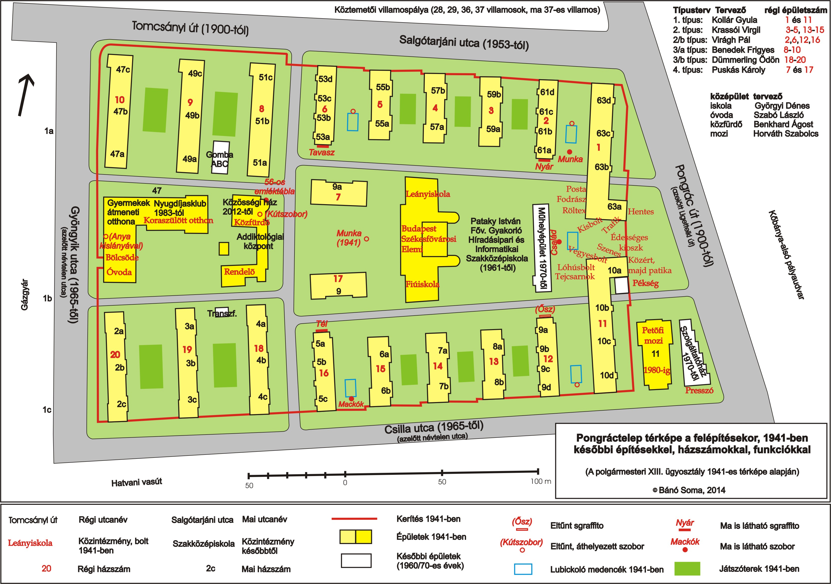 Pongráctelep helytörténeti térképe 1941-1990 közötti állapotok feltüntetésével